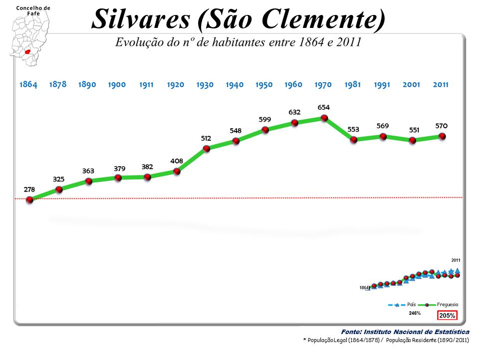 Censos 1864/2011